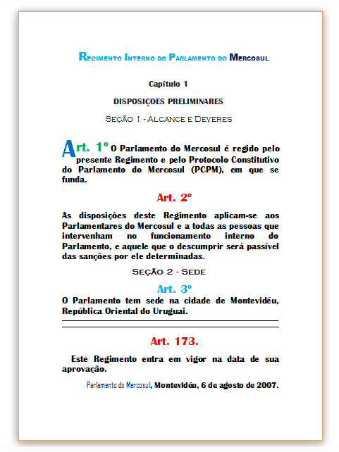 Imagem, em português, com parte inicial e o último artigo do Regimento Interno do Parlamento do MERCOSUL.